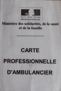 professional card